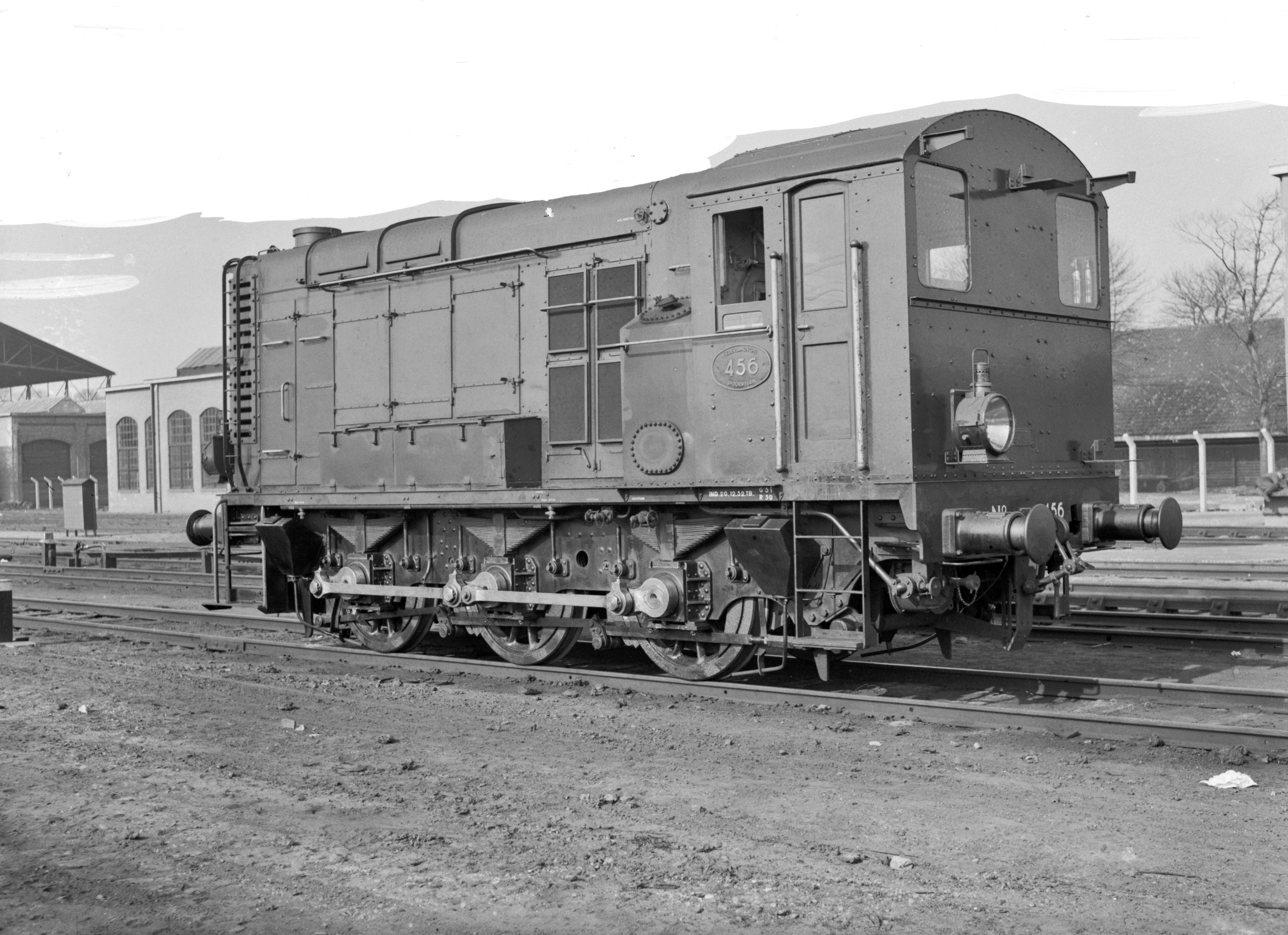 Afbeelding van de diesel-electrische rangeerlocomotief nr. 456 (serie 400, nrs. 451-465, in 1953 vernummerd tot de serie 700) van de N.S. op het emplacement te Utrecht.